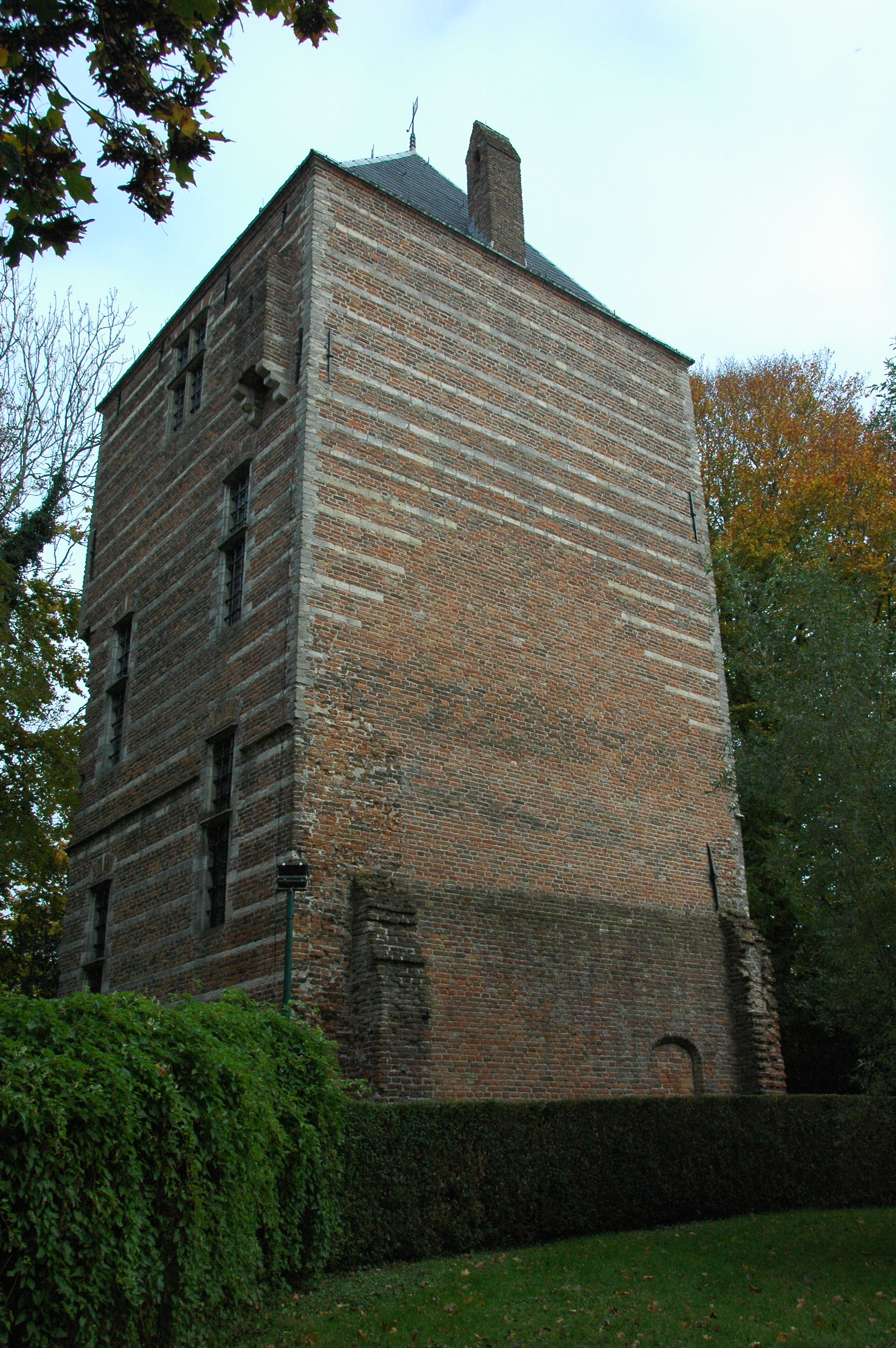 Kasteel IJsselstein, IJsselstein Categorie:Wikipedia:Afbeeldingen/Gebruiker:P.H. Louw